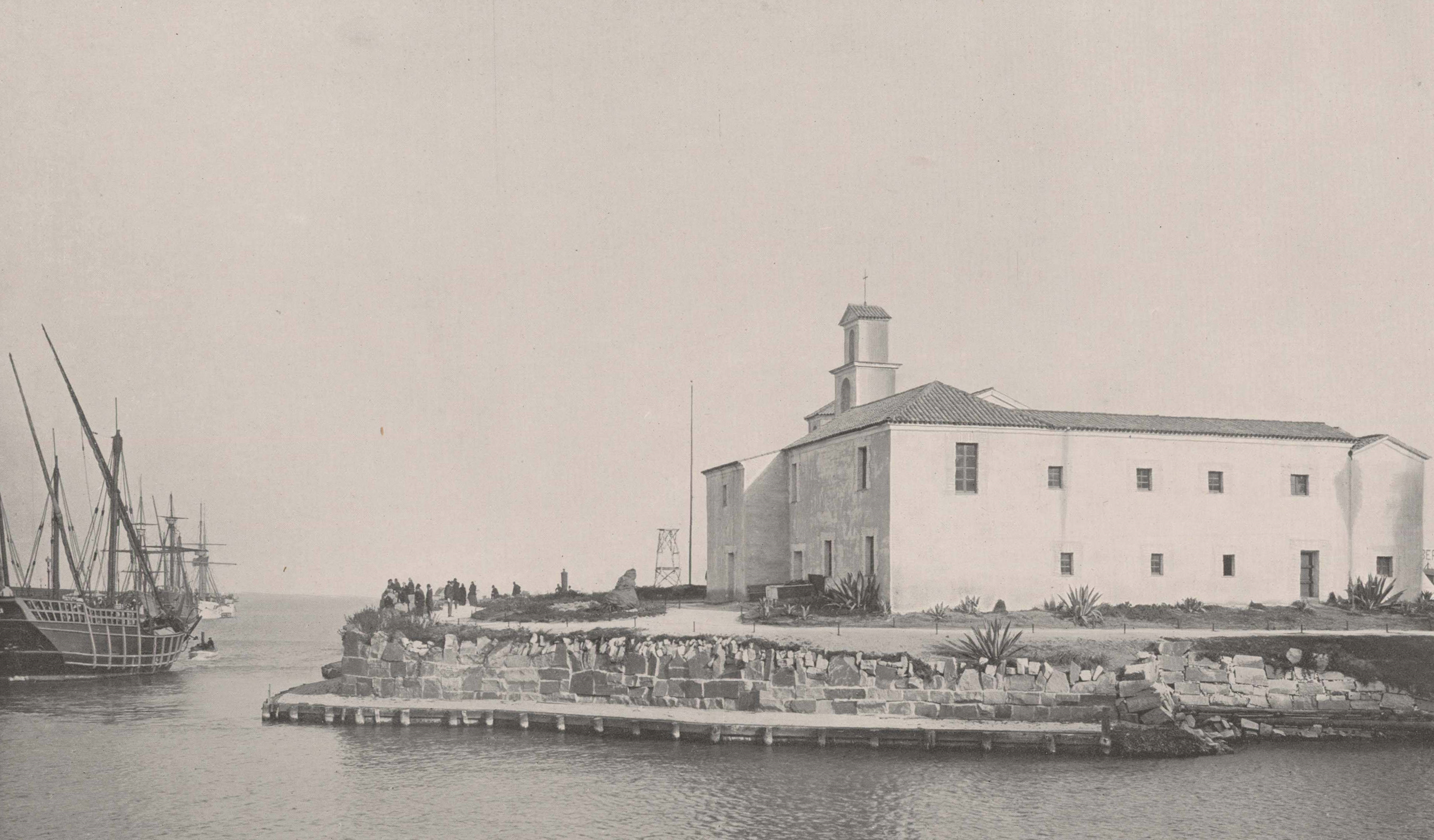 Monasterio de La Rábida en la Exposición Mundial Colombina de Chicago.